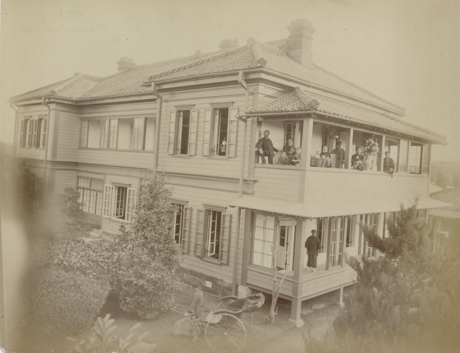 Woonhuis van Rouwenhorst Mulder? Met koets, bewoners en personeel. Uit album 3: indrukken van Japan . Gemaakt voor 1890.